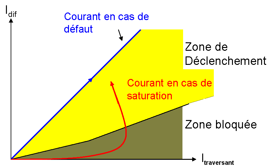 blocage de la protection differentielle en cas de saturation des transformateurs de courant